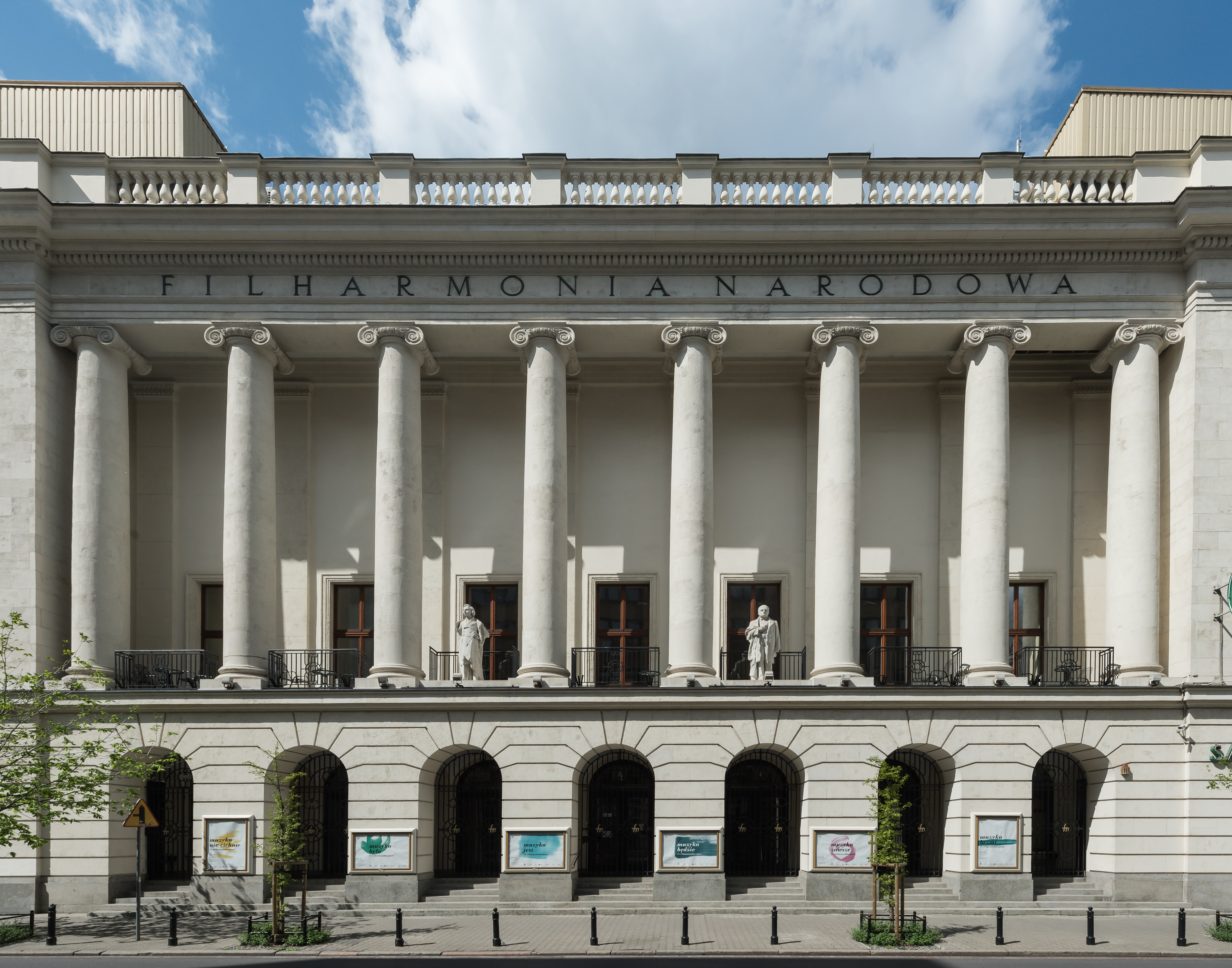 Filharmonia Narodowa w Warszawie, wejście główne